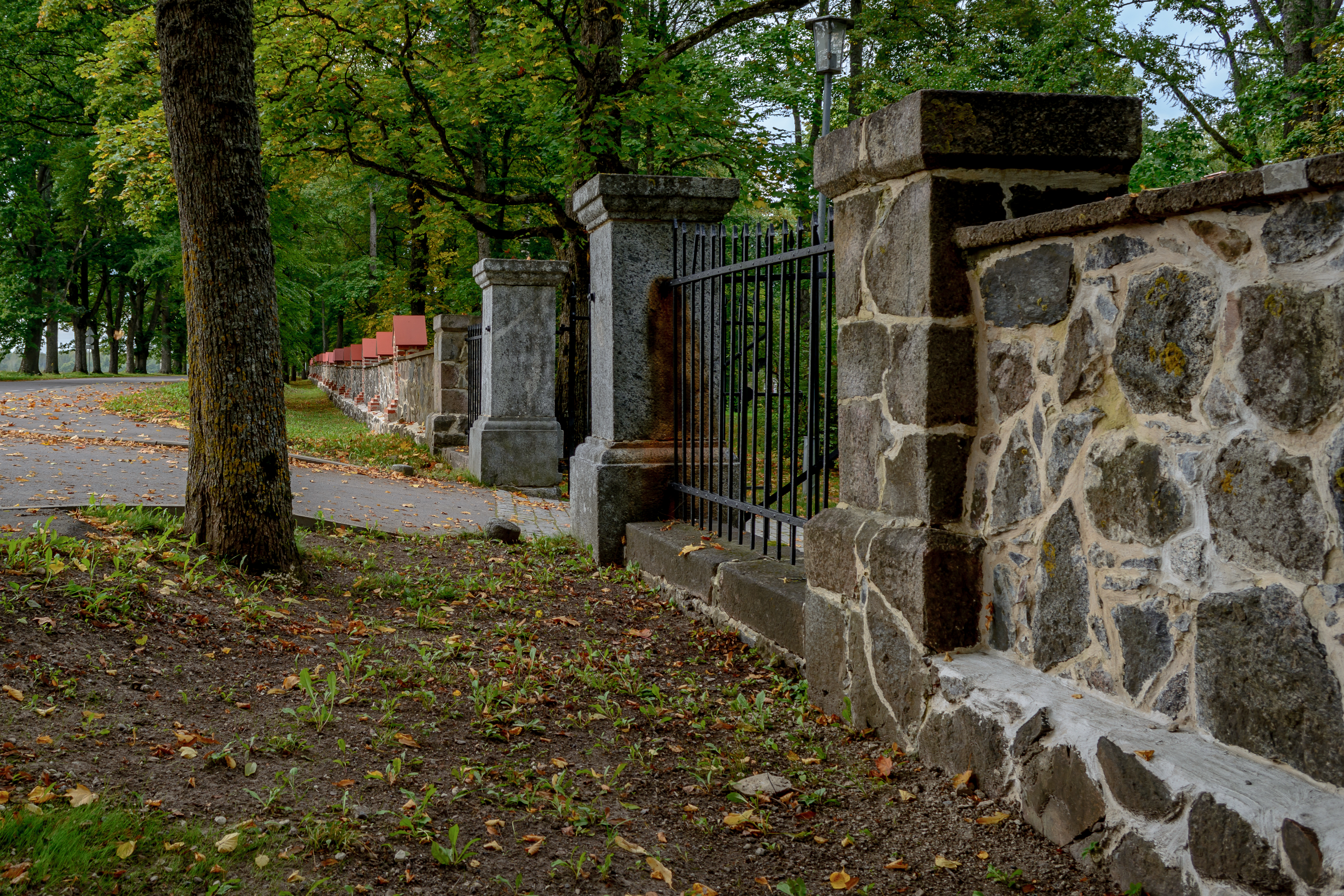 Olustvere mõisa piirdemüür väravapostidega, 20.saj. I pool